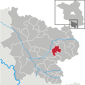 Heideland in Brandenburg (Country) - District Elbe-Elster